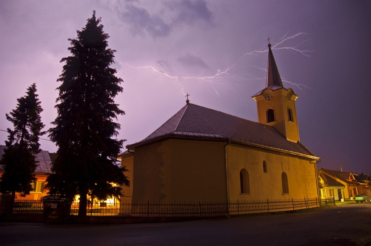 Kostol svätej Doroty v obci Forbasy